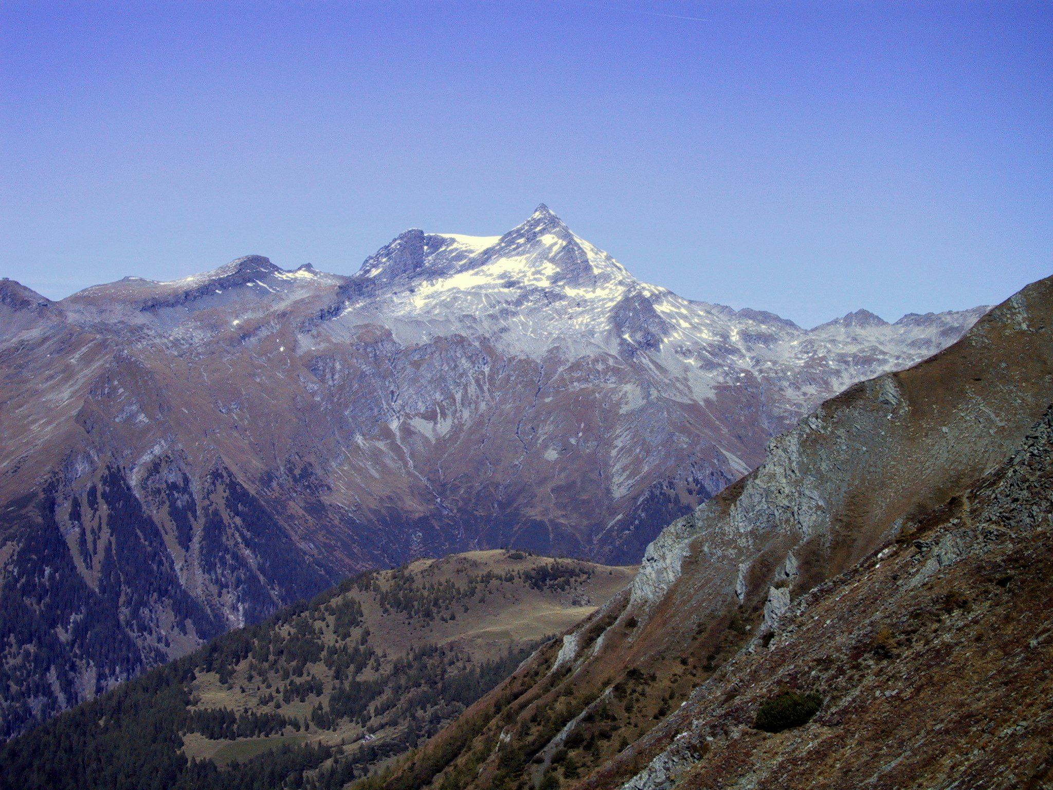 Ankogel